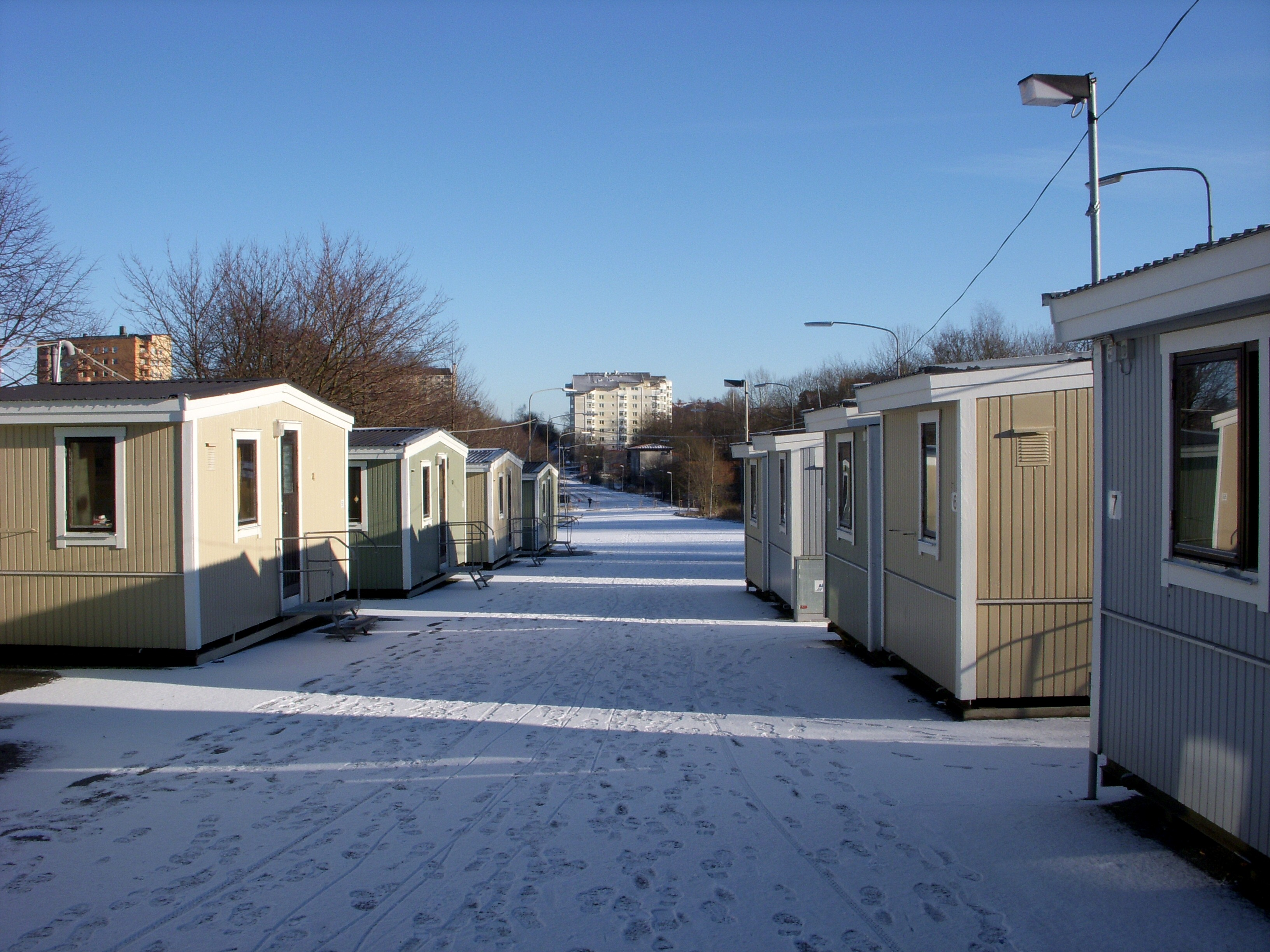 Huvudstaleden (aldrig genomförd motorvägsprojekt) i Solna och Stockholm